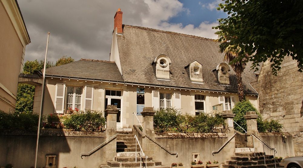 La Mairie